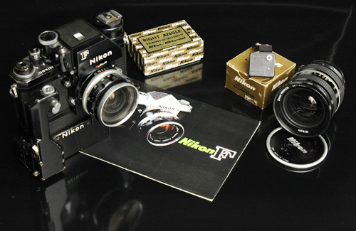 Nikon F avec moteur F36